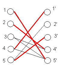 matching maximo del grafo de las igualdades. Matching maximo del grafo M={(1,5'),(2,5'),(4,1'),(5,4')}